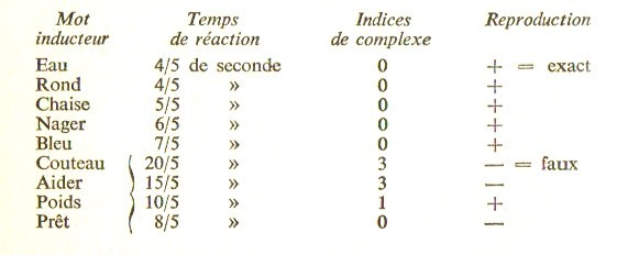 Un exemple d'un test des associations libres selon C.G.Jung révélant les complexes psychiques